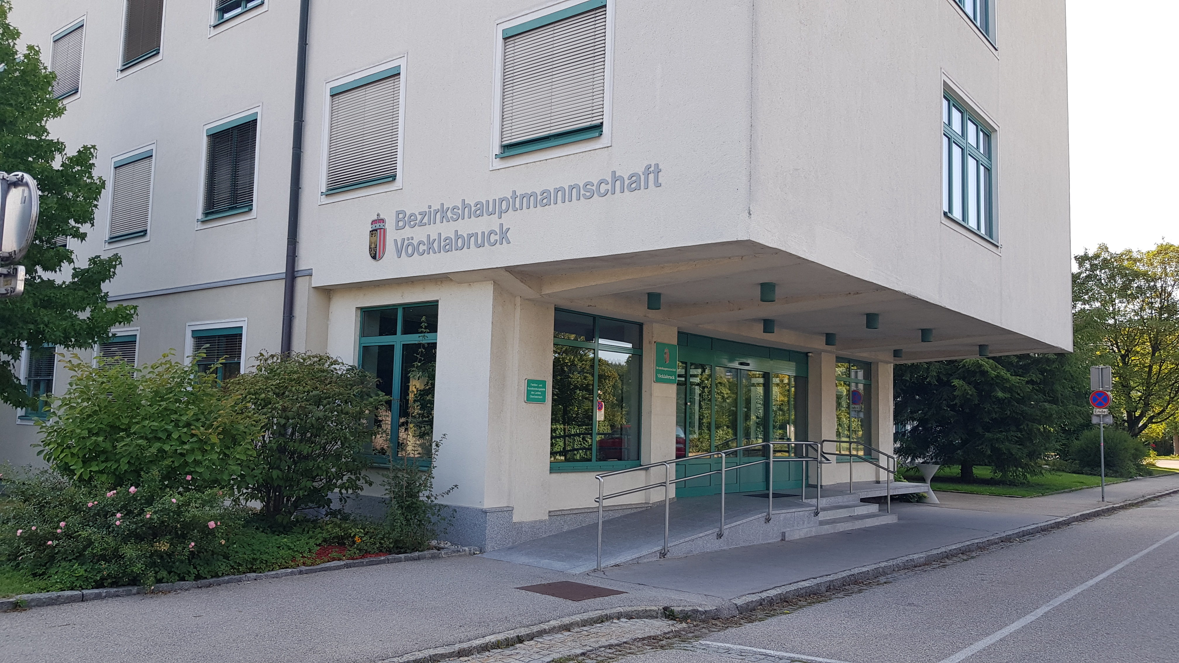 Gebäude der Bezirkshauptmannschaft Vöcklabruck